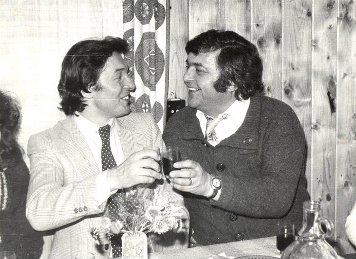 přípitek